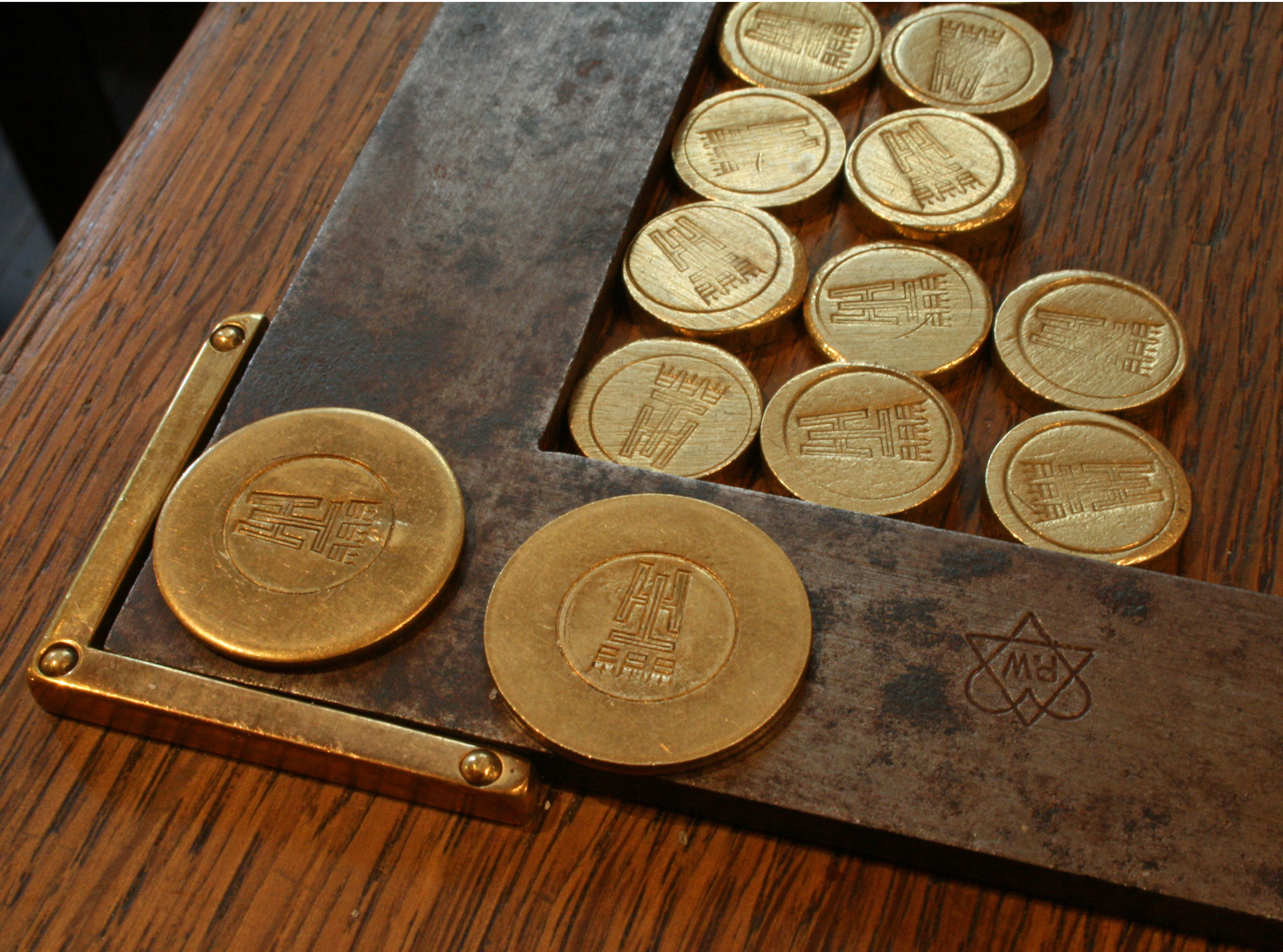 Biermarken auf dem Thekenschaaf, Haus Töller, Köln